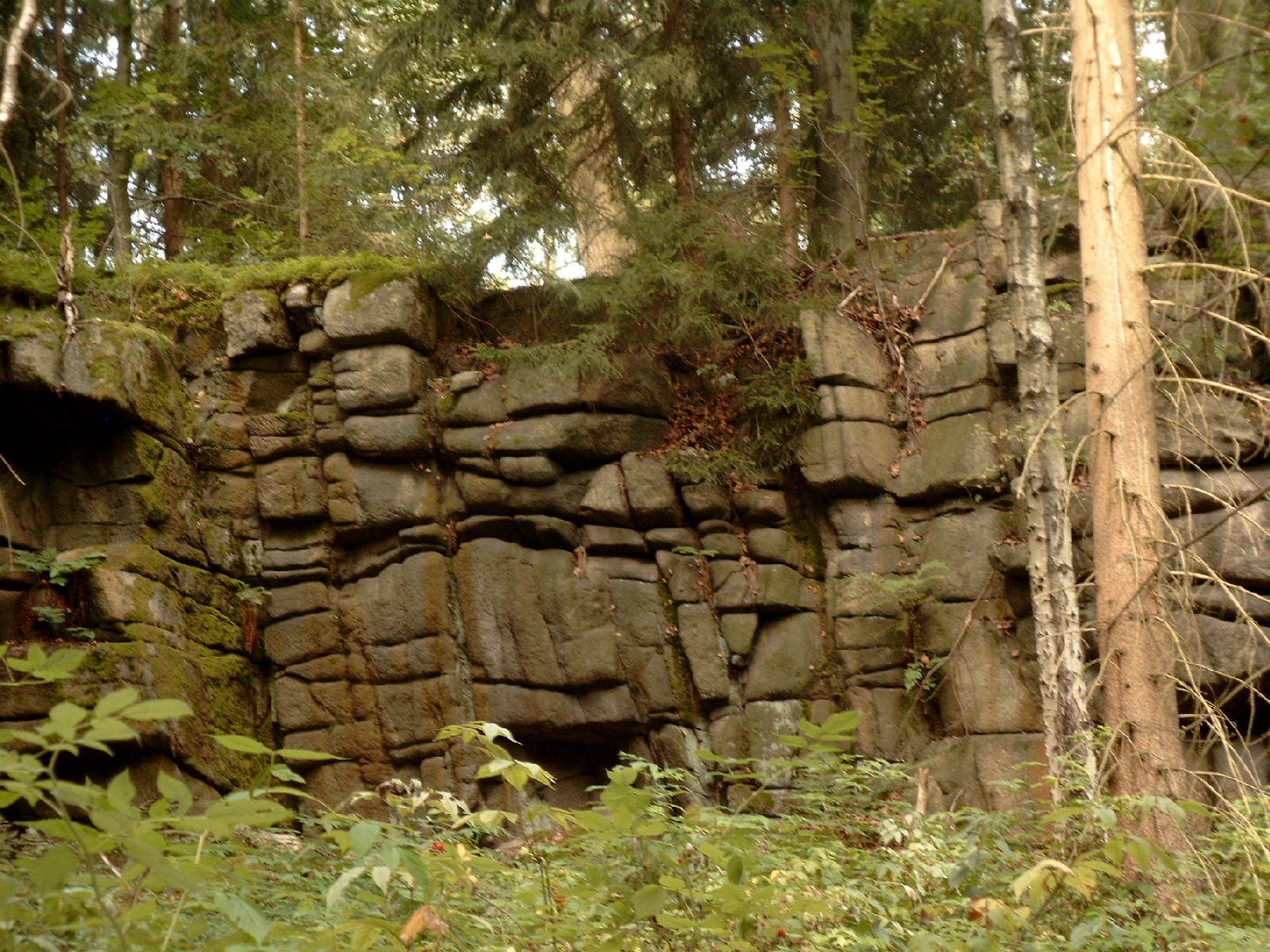 Granitschichten wie eine Steinmauer in mehreren, gegeneinander versetzten Stufen. Die senkrechten Wände lassen typische Verwitterungsformen mit abgerundeten Kanten erkennen, die auch Wollsäcke genannt werden.